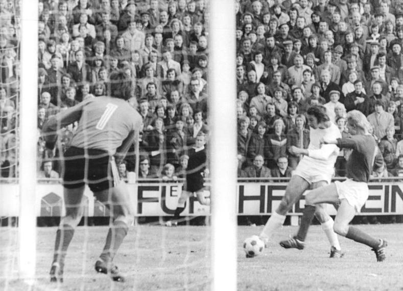 ADN-ZB-Thieme-6.11.76-ma-Karl-Marx-Stadt: Fußball-Oberliga, FC Karl-Marx-Stadt-BFC Dynamo 2: 0-Jürgen Bähringer (FC Karl-Marx-Stadt-2.v.r.) ist in den Strafraum eingedrungen und versucht einen Torschuß.Links Torwart Hans-Gustav Creydt, rechts Peter Rohde (beide DFC Dynamo) .Nach diesem Erfolg ist jetzt der FC Karl-Marx-Stadt, der seine bemerkenswert guten Leistungen der letzten Wochen auch im Heimspiel gegen den Berliner FC Dynamo fortsetzte, Tabellenzweiter der DDR-Fußballoberliga.